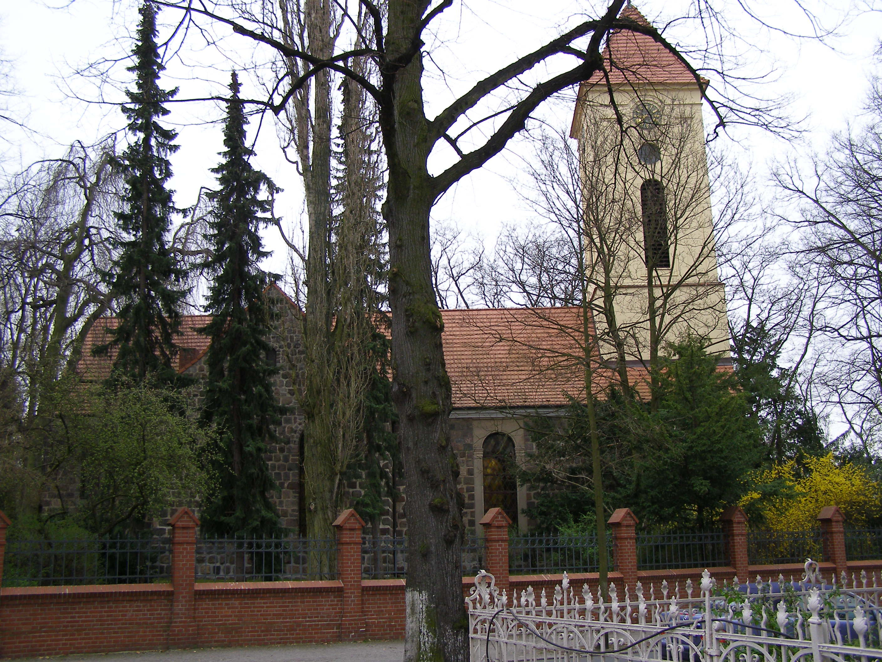 Dorfkirche in Rudow, Berlin